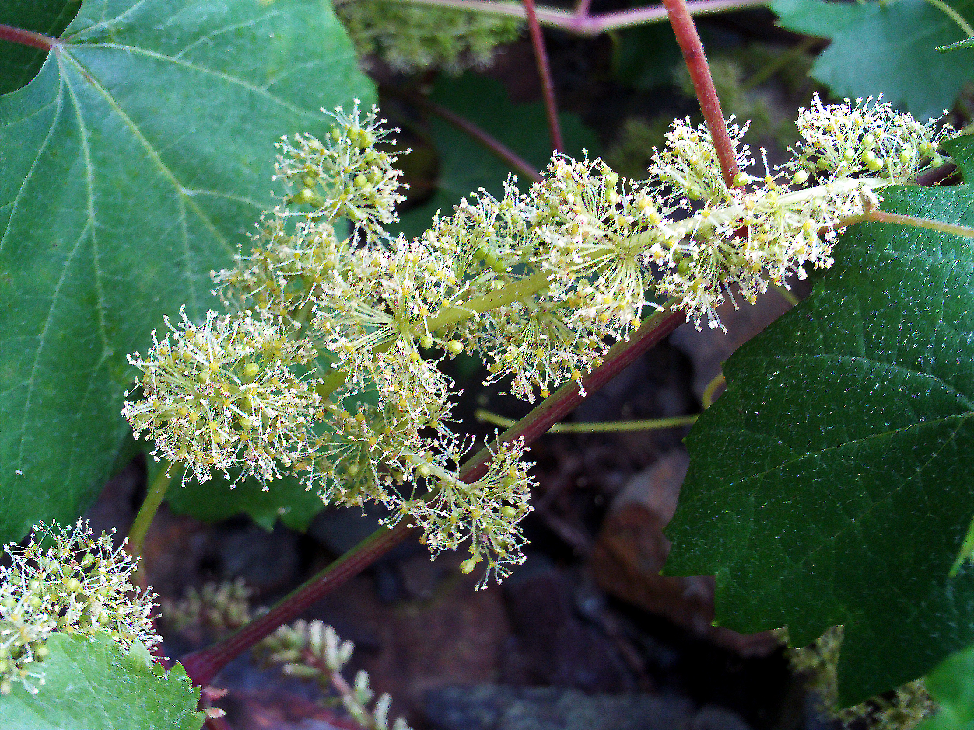 Vitis vinifera var. sylvestris Closeup Sierra Madrona